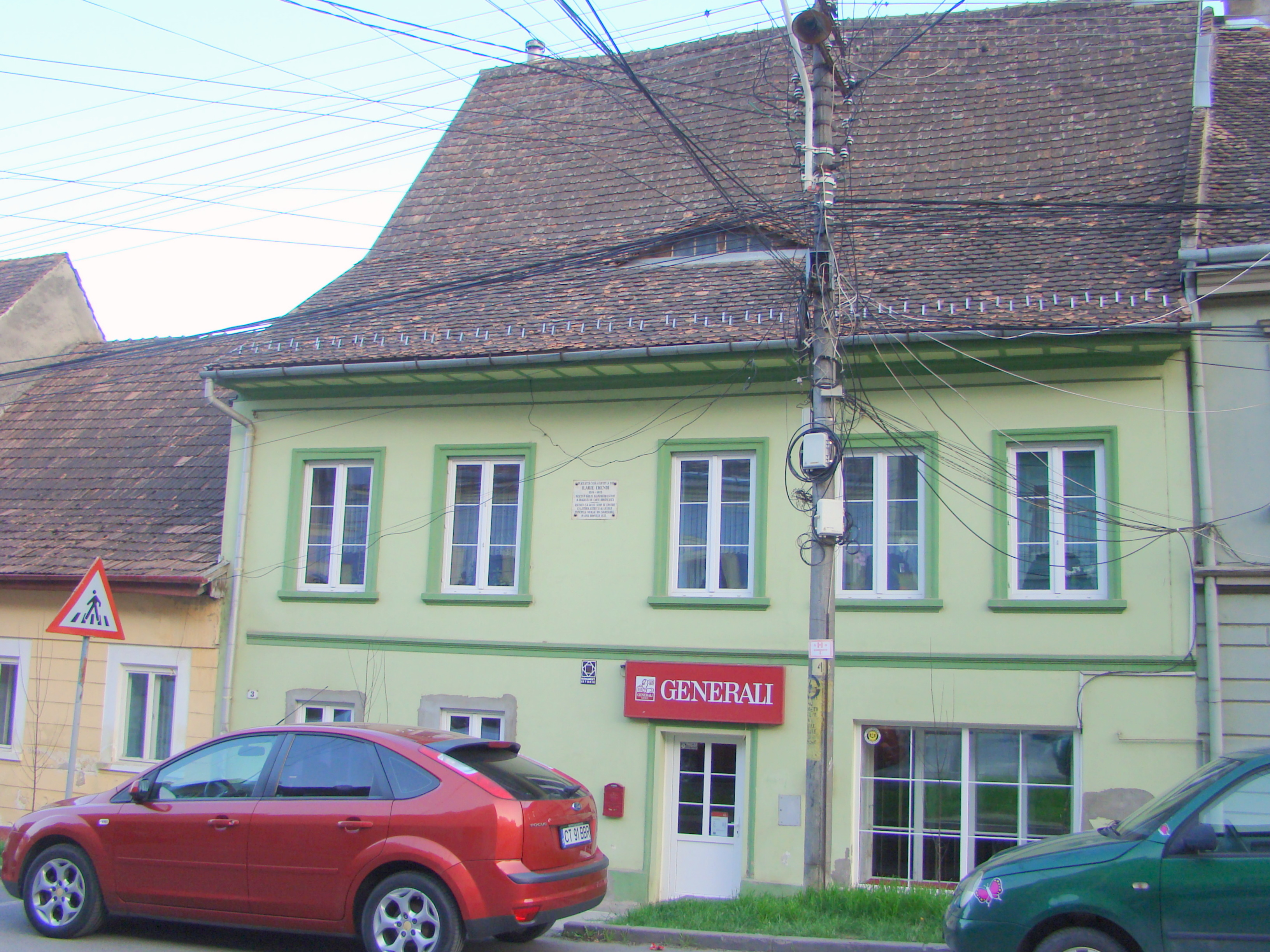 Casă, municipiul Sighișoara, str. Chendi Ilarie 3 1750 - 1825, modif. sec. XX